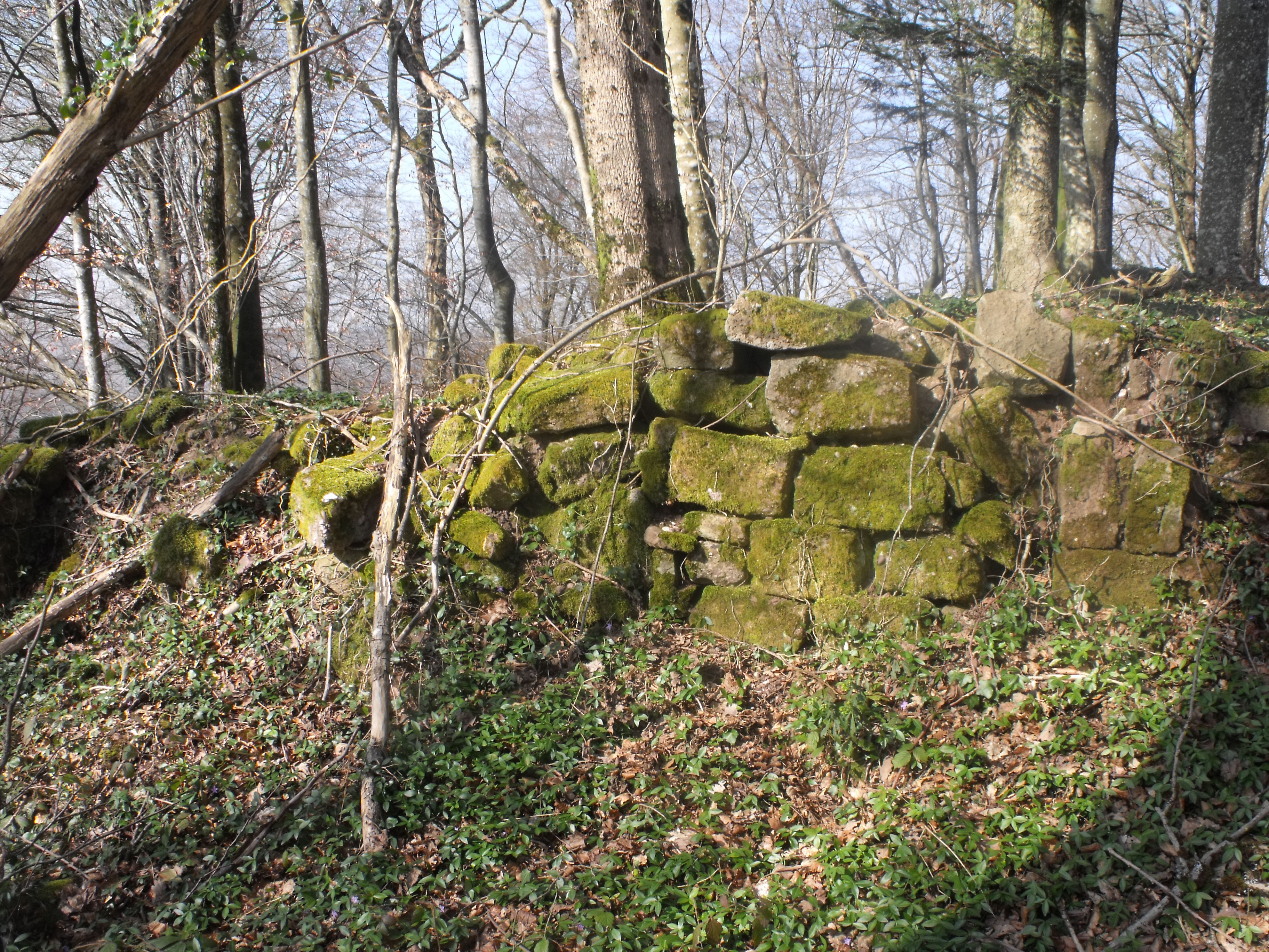 Rare vestige de l'ancien château d'Etobon, Haute-Saône, France